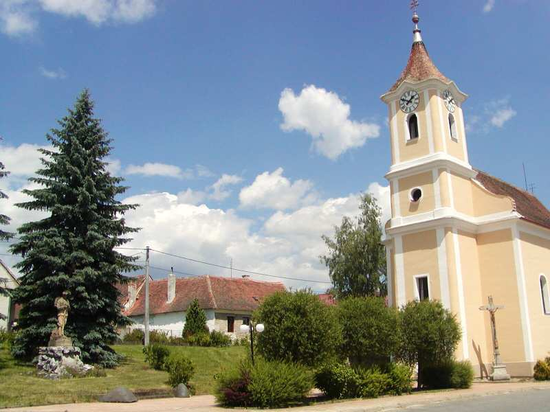 Kostel sv. Vavřince s památníkem obětem 1. světové války